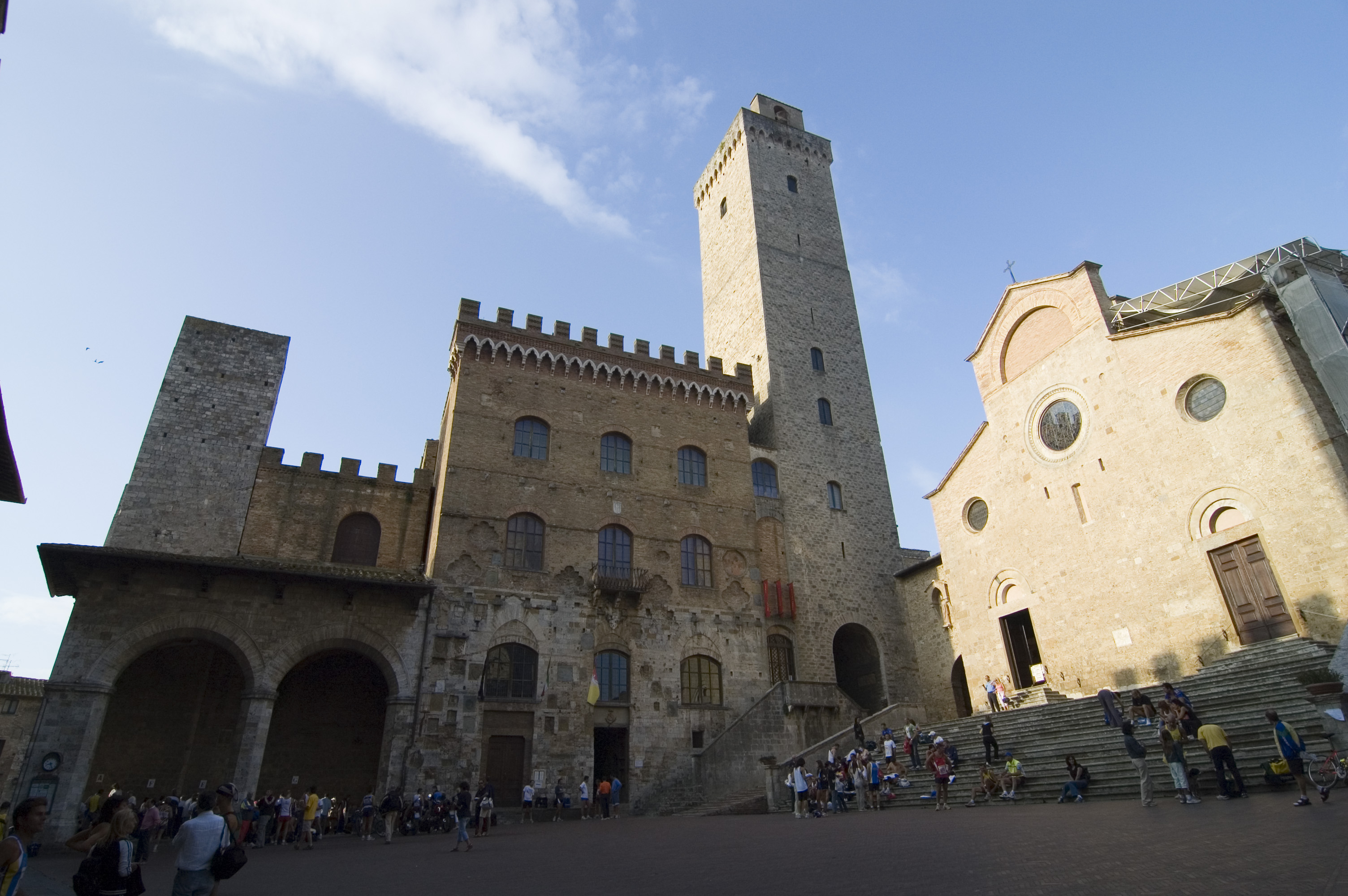 Collegiata e Palazzo del Popolo in San Gimignano - Italia.